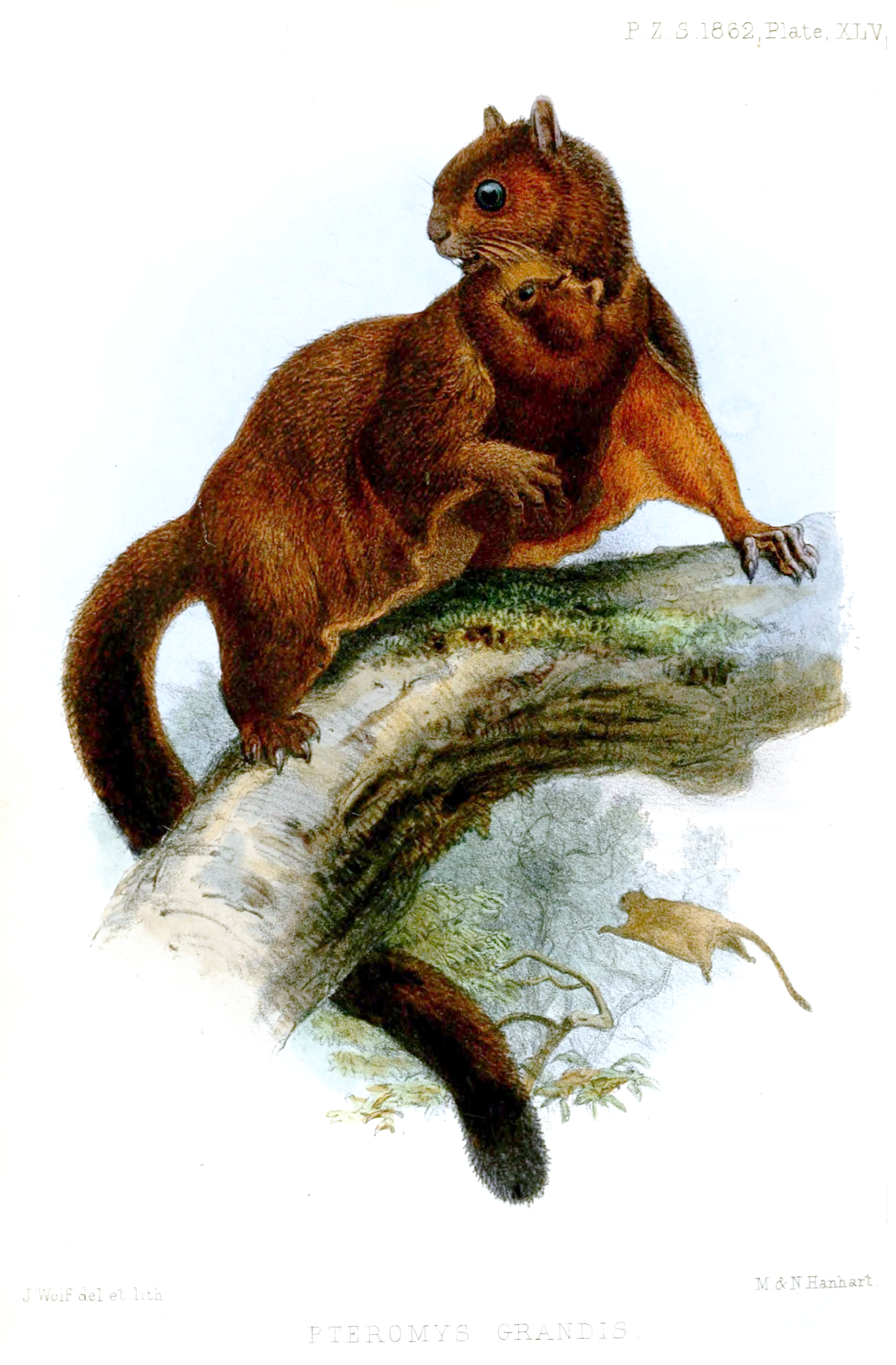 Pteromys grandis= Petaurista petaurista grandis